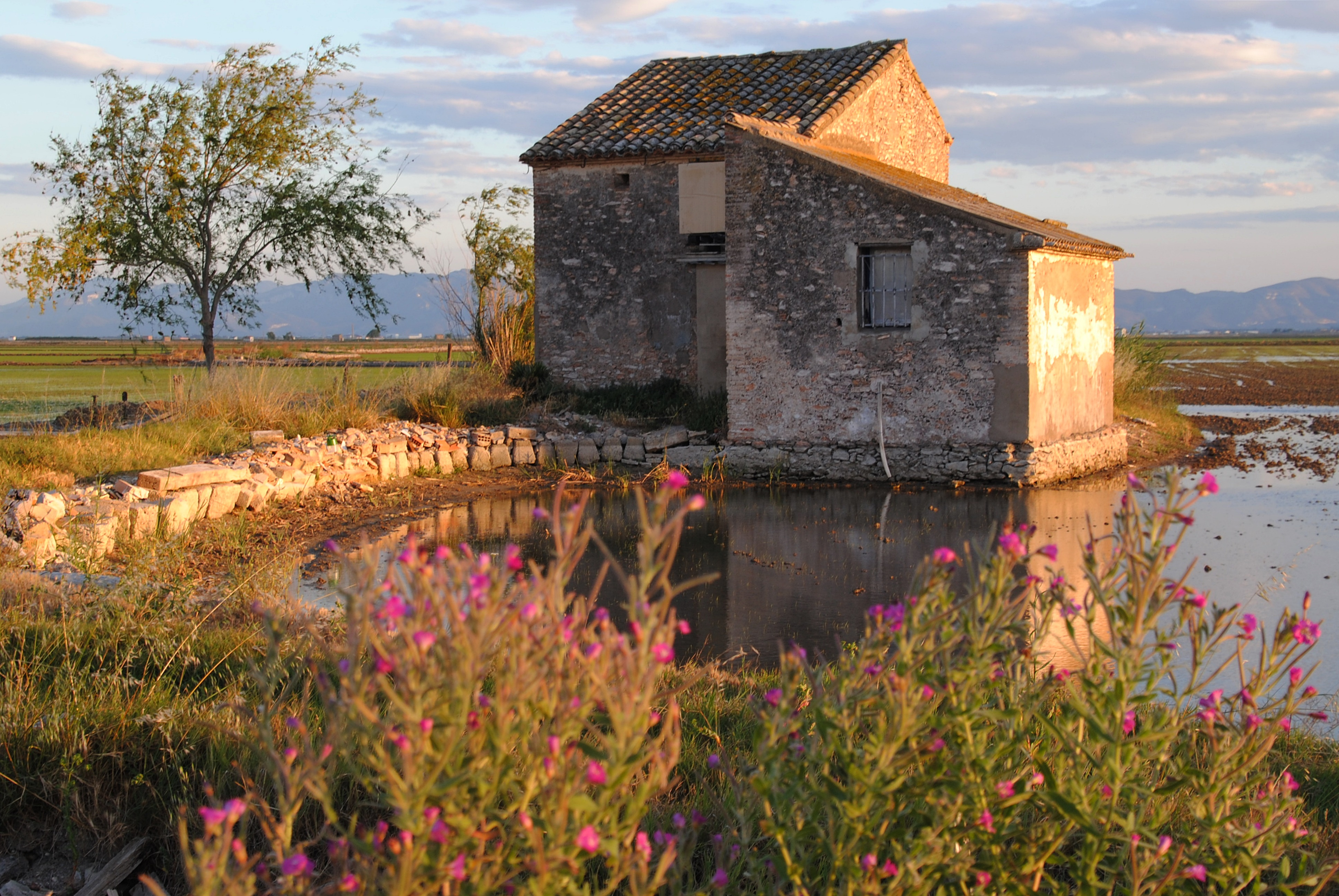 El Parque natural de la Albufera o La Albufera (Albufera, del árabe البحيرة al-buhayra, "el pequeño mar") es un parque natural de la provincia de Valencia, en la Comunidad Valenciana, España. Fue también conocido por los romanos como Nacarum Stagnum y en algunos poemas árabes se le denomina Espejo del sol. Este paraje de 21.120 ha, que fue nombrado parque natural por la Generalidad Valenciana el 23 de julio de 1986, se encuentra situado a unos 10 km al sur de la ciudad de Valencia. El parque natural comprende el sistema formado por la Albufera propiamente dicha, su entorno húmedo, y el cordón litoral adyacente a ambos.1 This is a photography of a Special Area of Conservation in Spain with the ID: ES0000023. Natura2000 entry, EEA entry